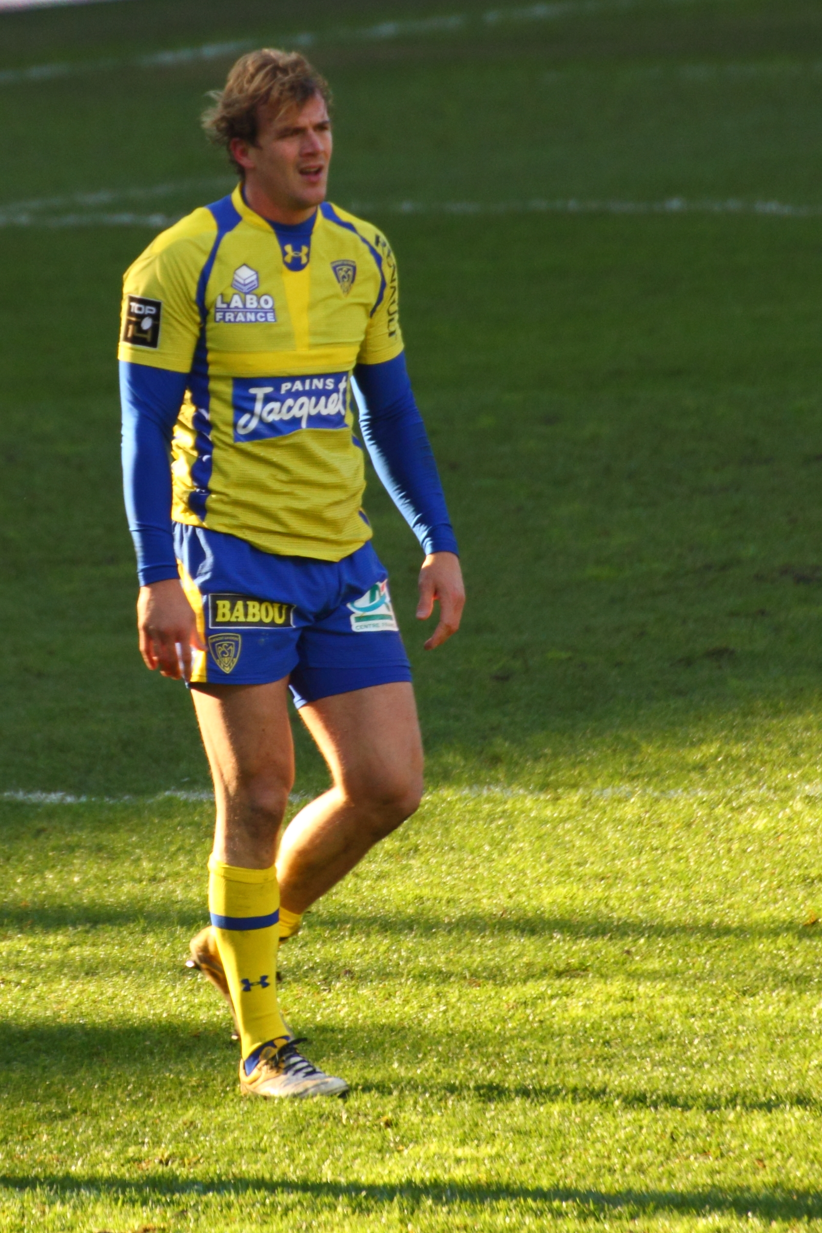 Top 14 2012-2013 — 1 décembre 2012, Stadium de Toulouse. Match between: Stade toulousain — ASM Clermont-Auvergne